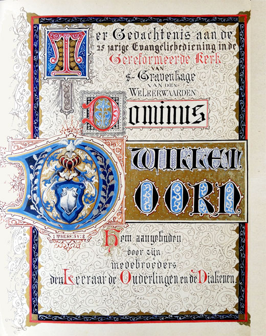 Familiewapen van de familie Doorn, nazaten van Ds Willem Doorn, gevonden in een boek ter nagedachtenis aan zijn 25 jarig ambtsjubileum in de Nobelstraatkerk, getekend door zijn zoon Petrus Doorn.